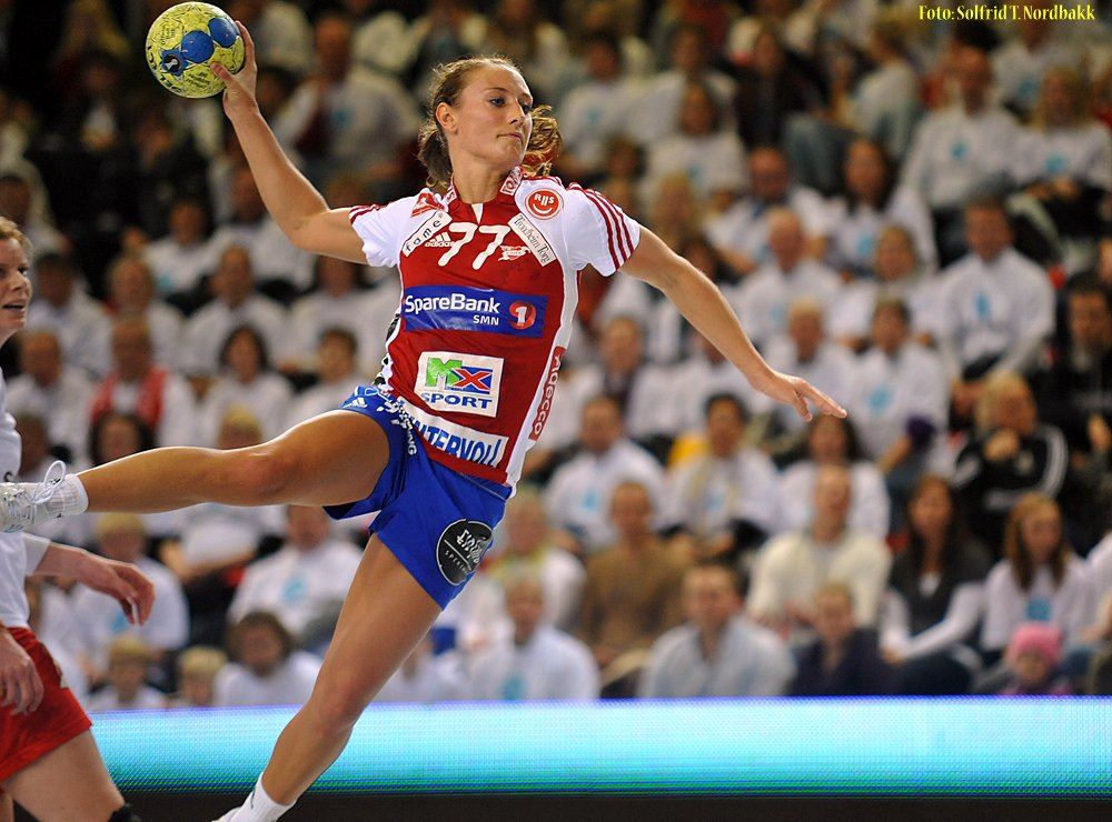 Camilla Herrem i kamp mot Larvik i Larvik Arena